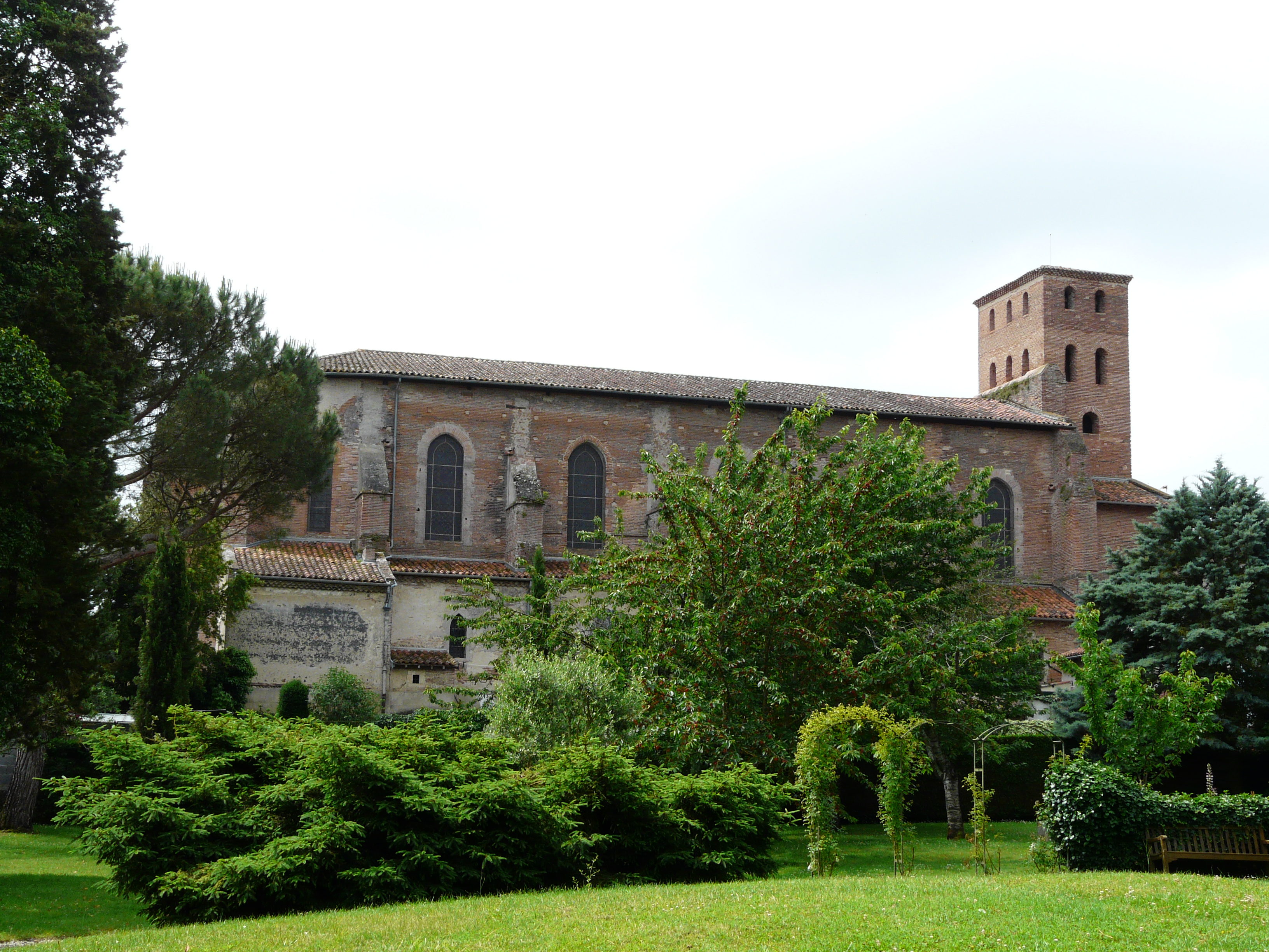 Le jardin du musée Abbal devant l'église Saint-Laurent, Carbonne, Haute-Garonne, France.